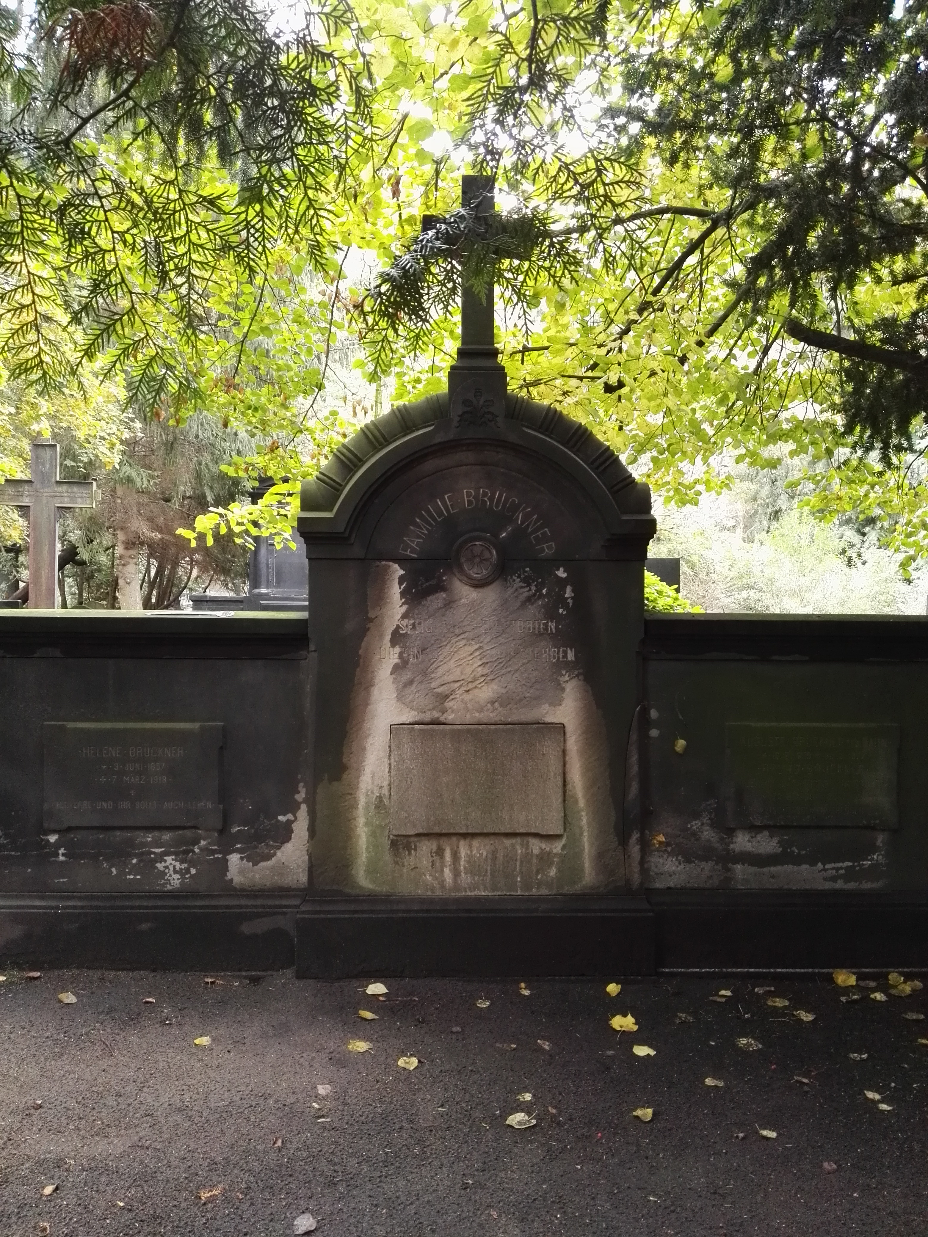 Grab von Bruno Brückner auf dem St.-Marien- und St.-Nicolai-Friedhof Pankow